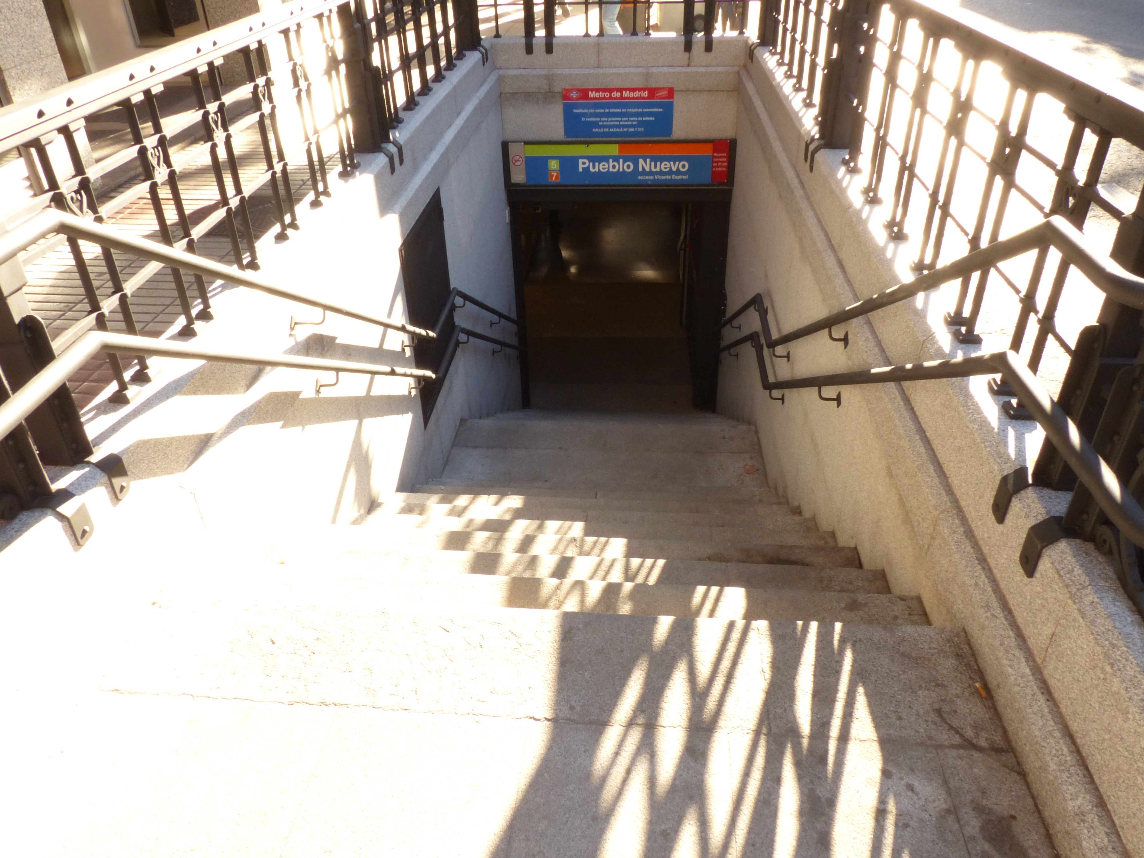 Estación de Pueblo Nuevo, una de las entradas.